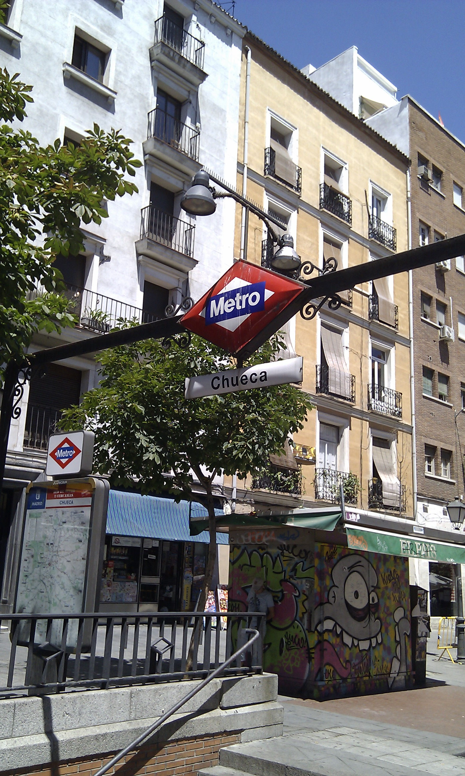 Boca de Metro Chueca